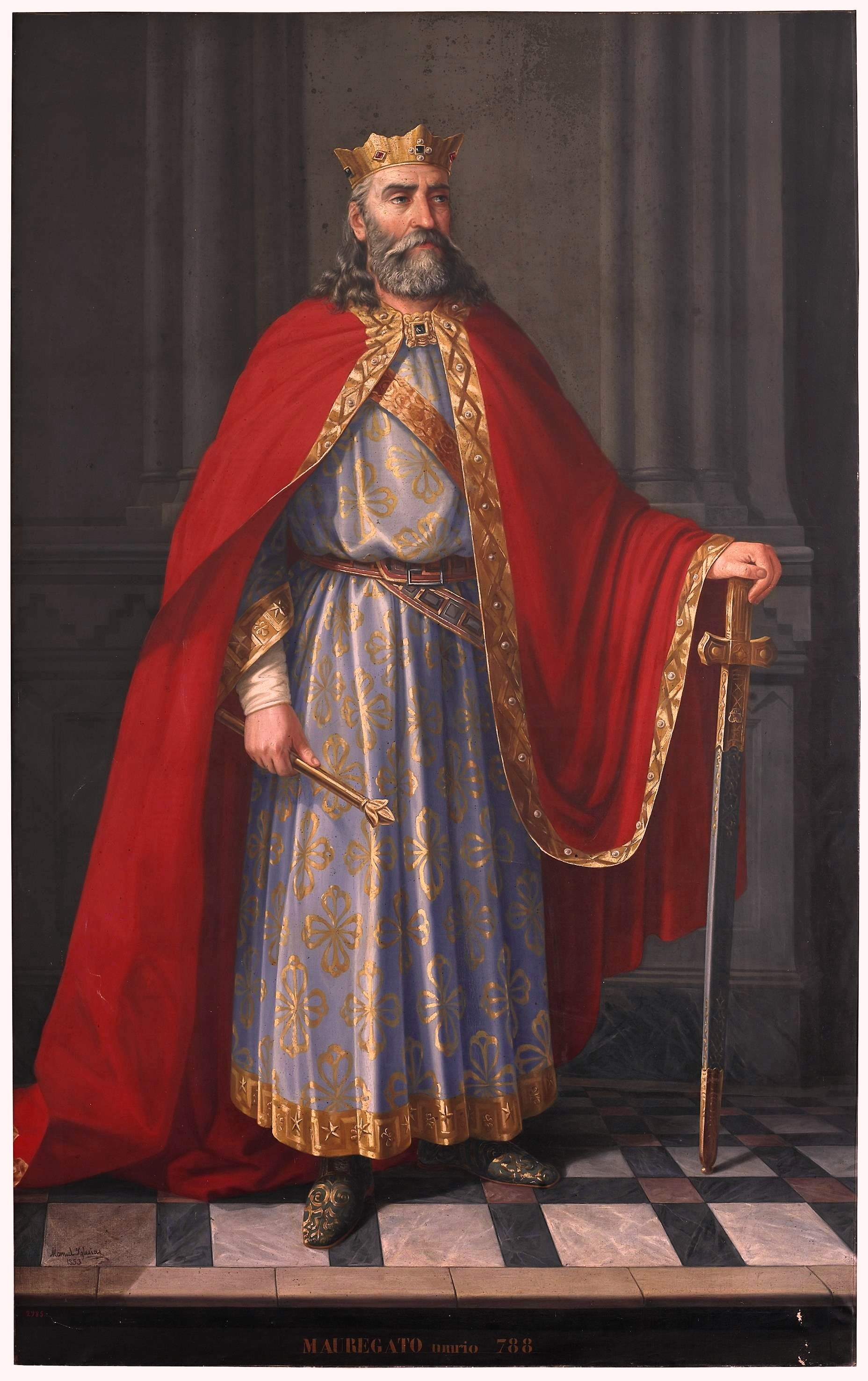 Retrato imaginario del rey Mauregato de Asturias († 789), que fue hijo ilegítimo del rey Alfonso I de Asturias y el sucesor del rey Alfonso II el Casto.